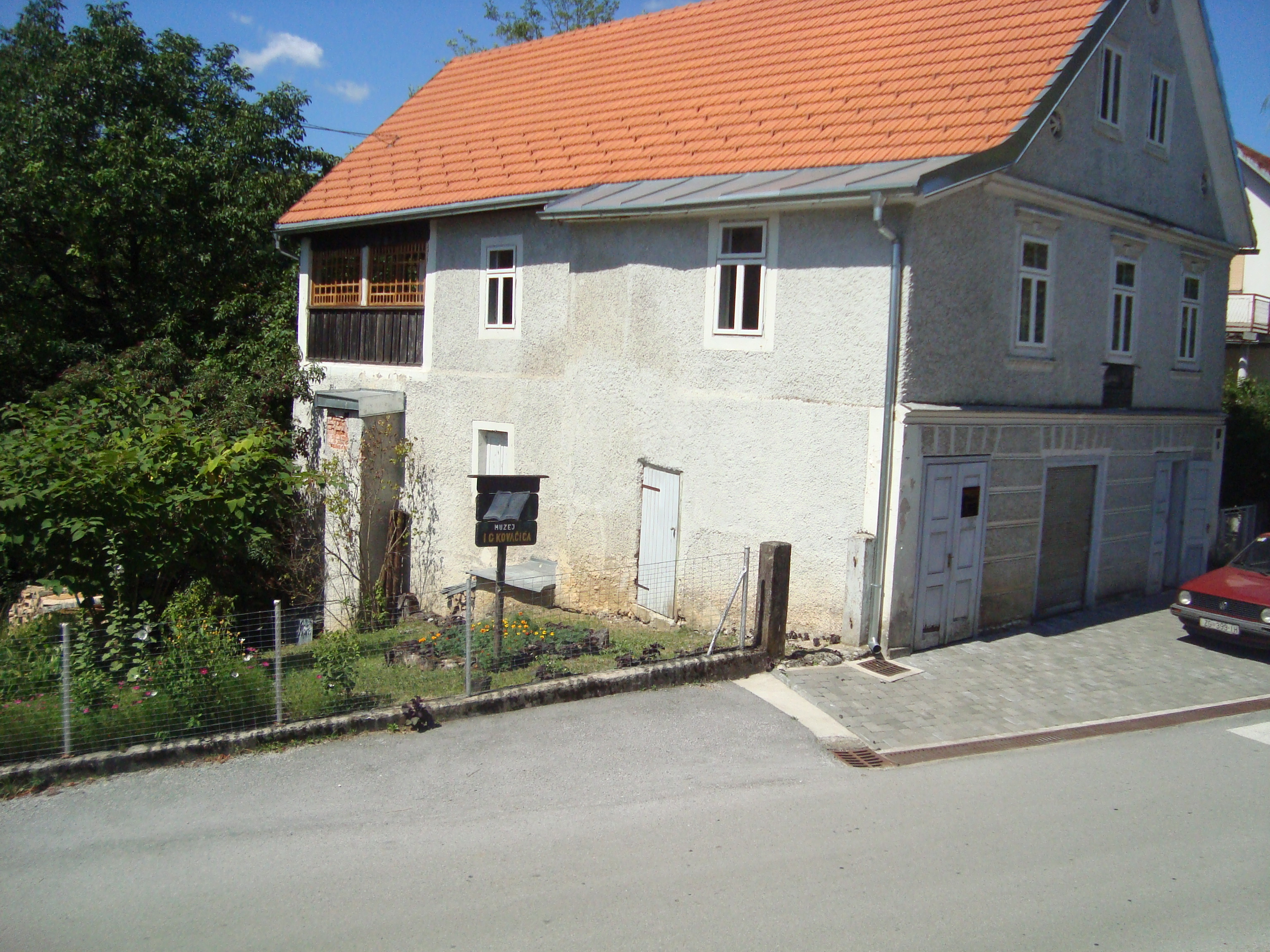 Rodna kuca I.G.K.-Muzej